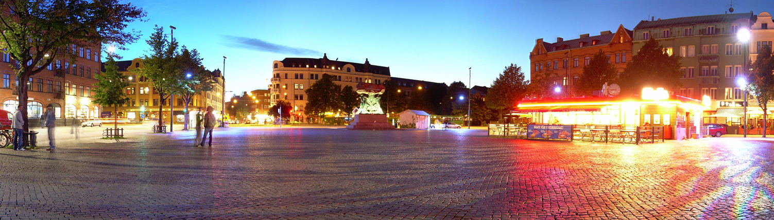 Möllevångstorget in Malmö, Sweden Best viewed at [/photo_zoom.gne?id=235270634&size=l Large Size] or [/photo_zoom.gne?id=235270634&size=o Full Size].